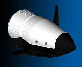 Grafik Kliper, sebst erstellt